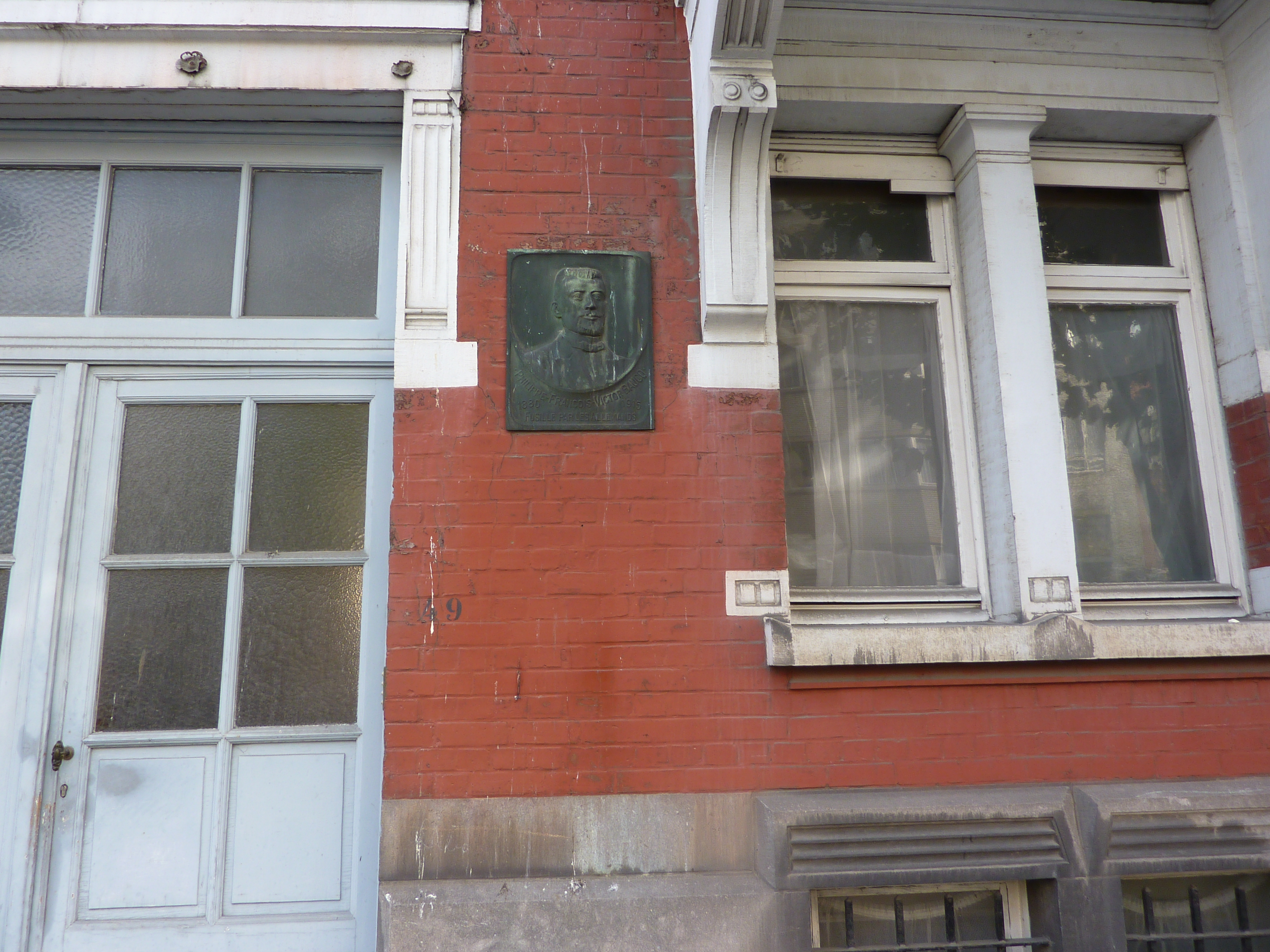 Plaque commémorative Philippe Baucq avenue de Roodebeek n°49 à Schaerbeek, Bruxelles, Belgique.